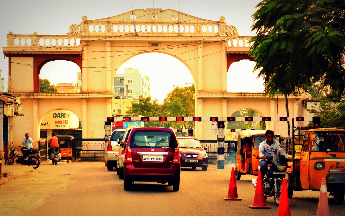 Moulali Kaman, Hyderabad